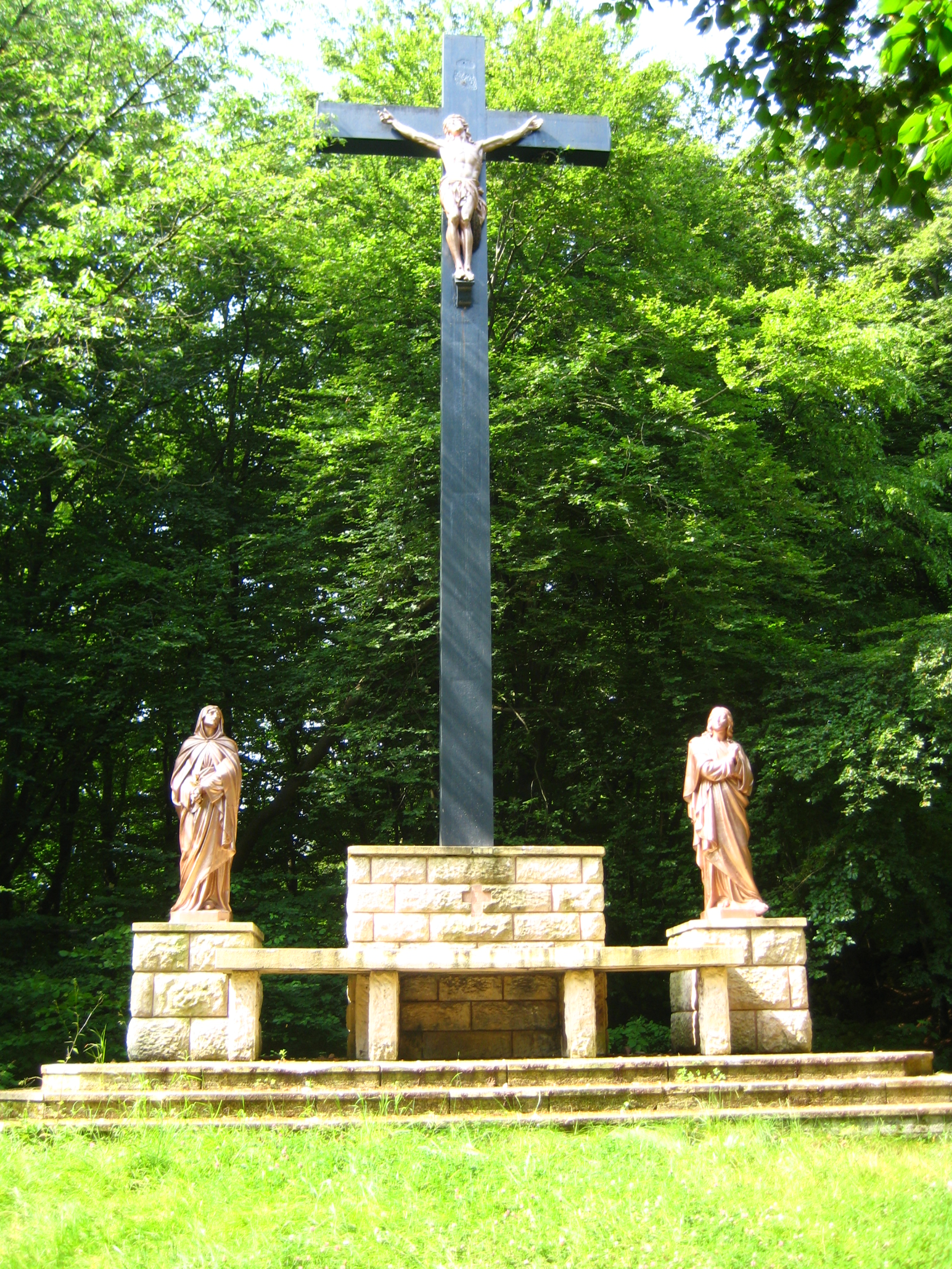 Description Calvaire du Chemin de Croix d'Audun-le-Tiche Date26 June 2009Sourcemon appareil photoAuthorAimelaime Calvaire du Chemin de Croix d'Audun-le-Tiche